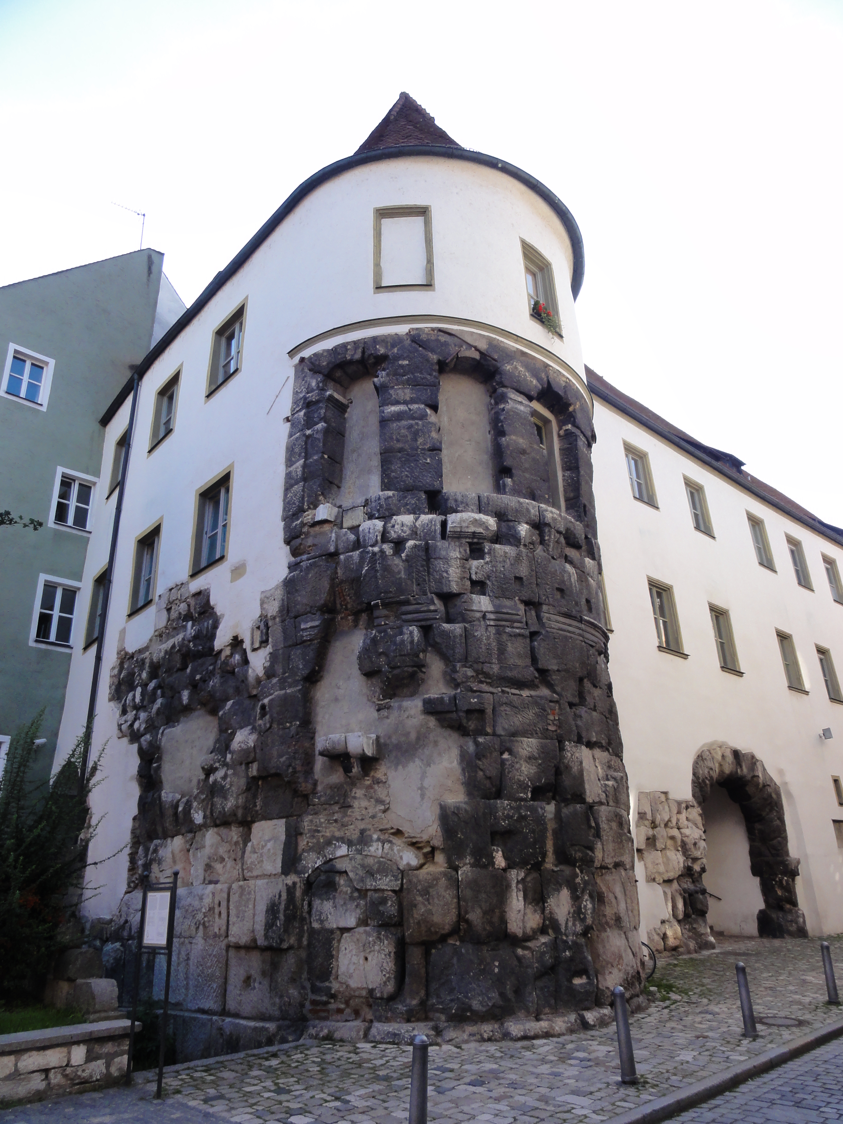 Porta Praetoria in Regensburg